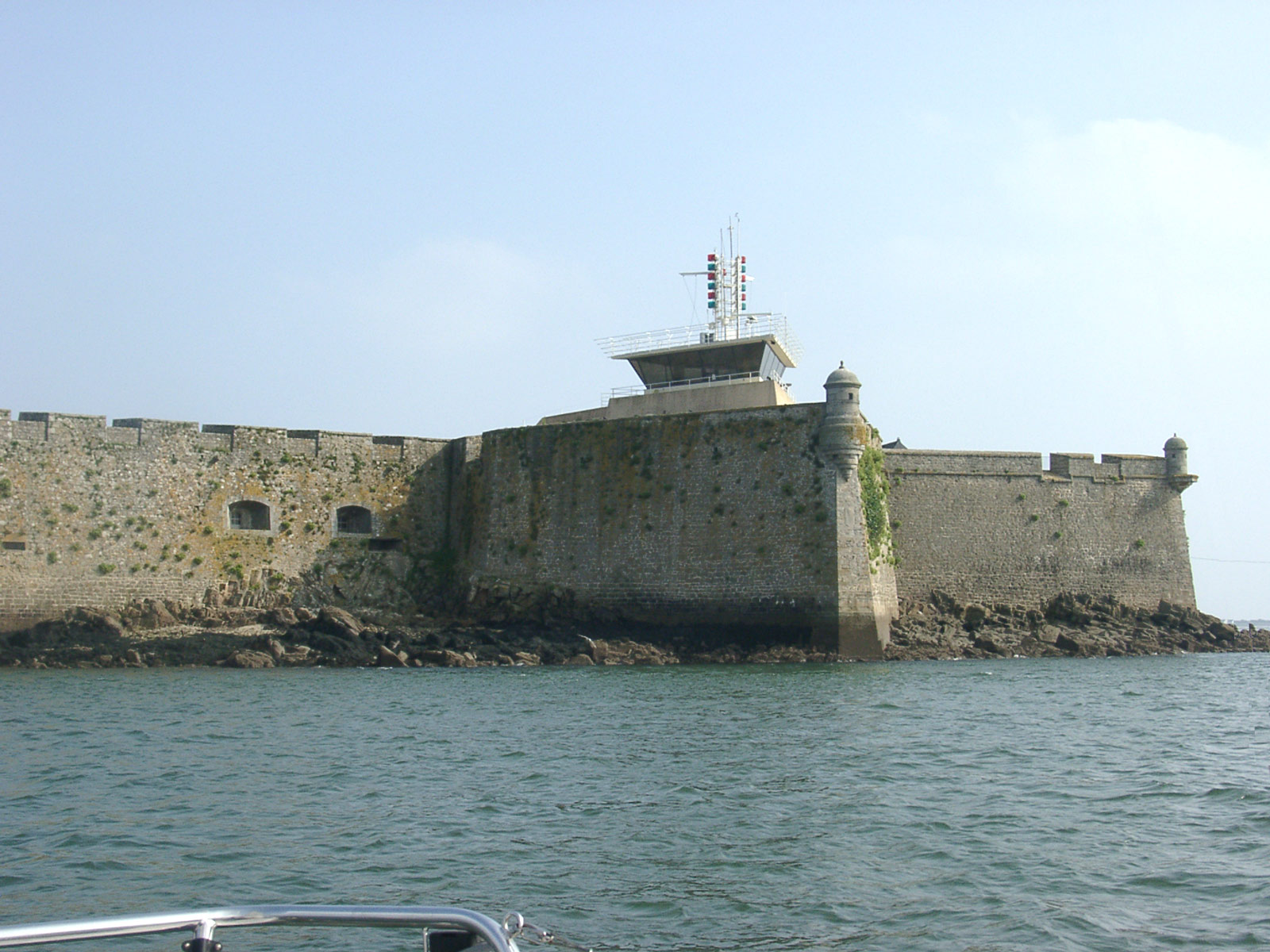 Description : Forteresse de Port Louis et sémaphore Lieu : Port Louis (près de Lorient), Bretagne, France Auteur : Pline Photo personnelle